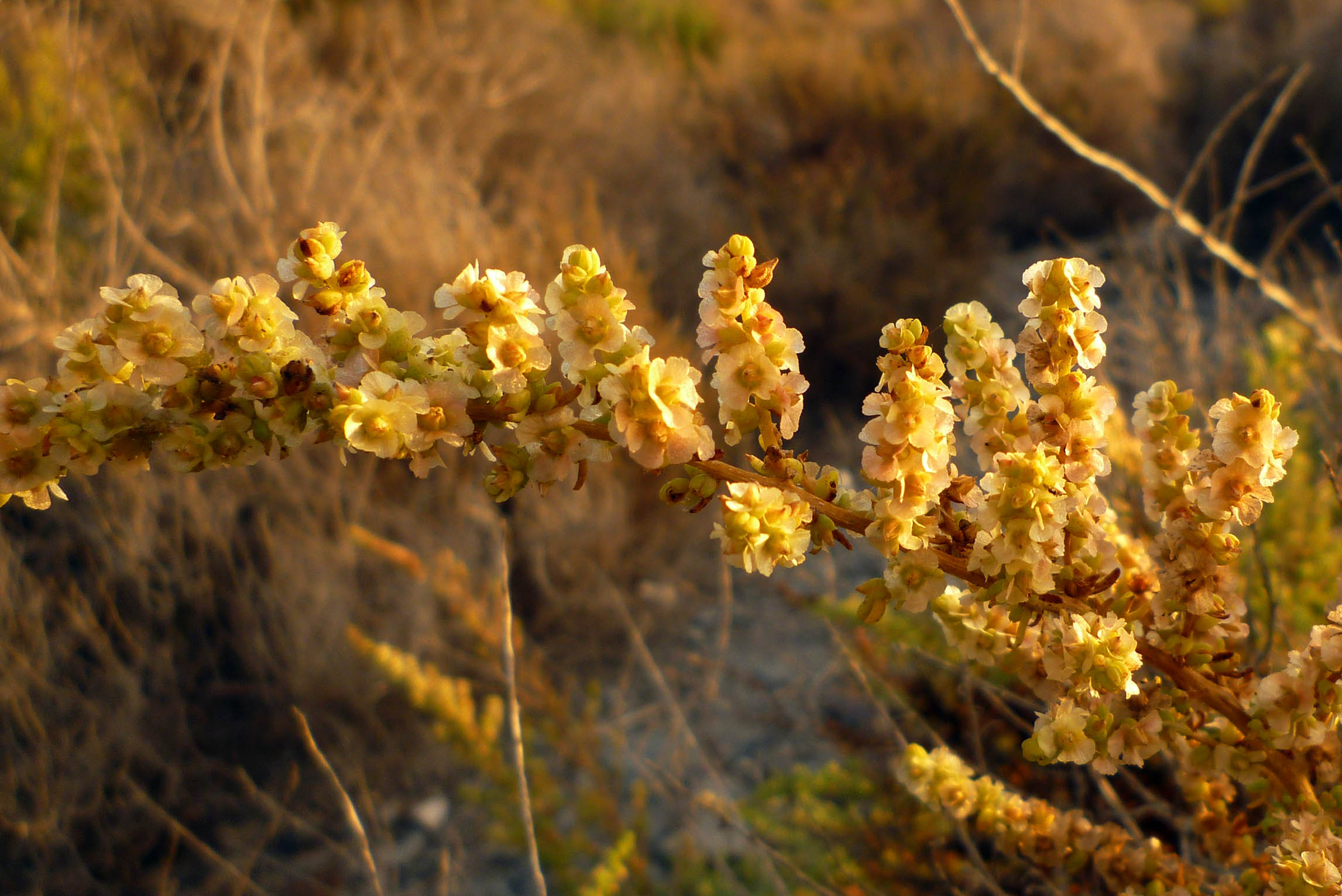 Salsola papillosa en Cala Reona, Cartagena, España.